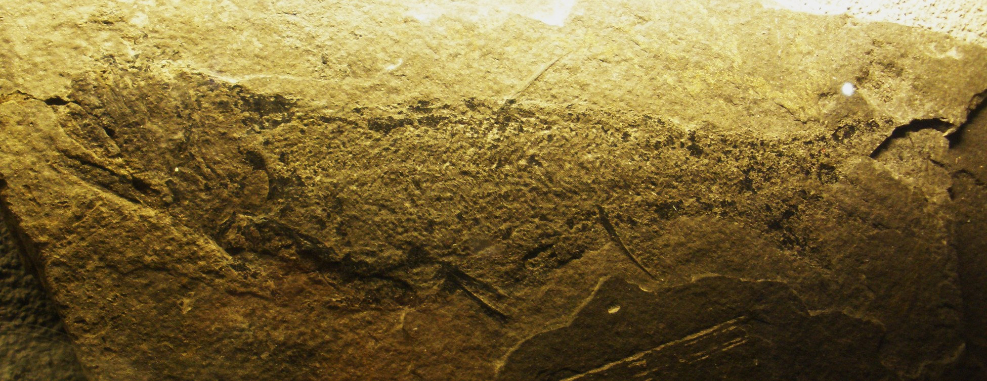 Fossil of Cheiracanthus, an extinct fish - Took the photo at Naturalis museum, Leiden